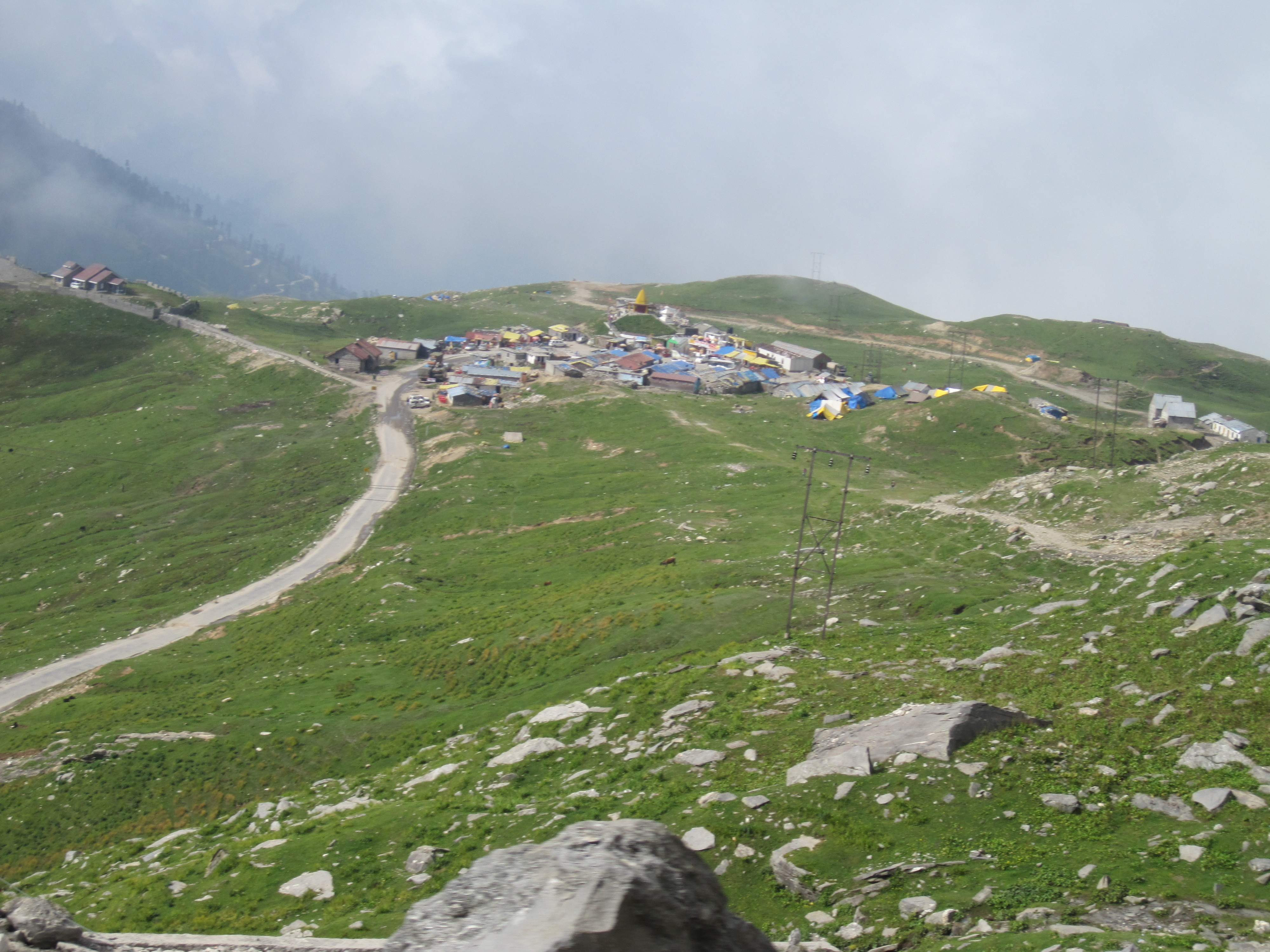 Marhi, Himachal Pradesh, India